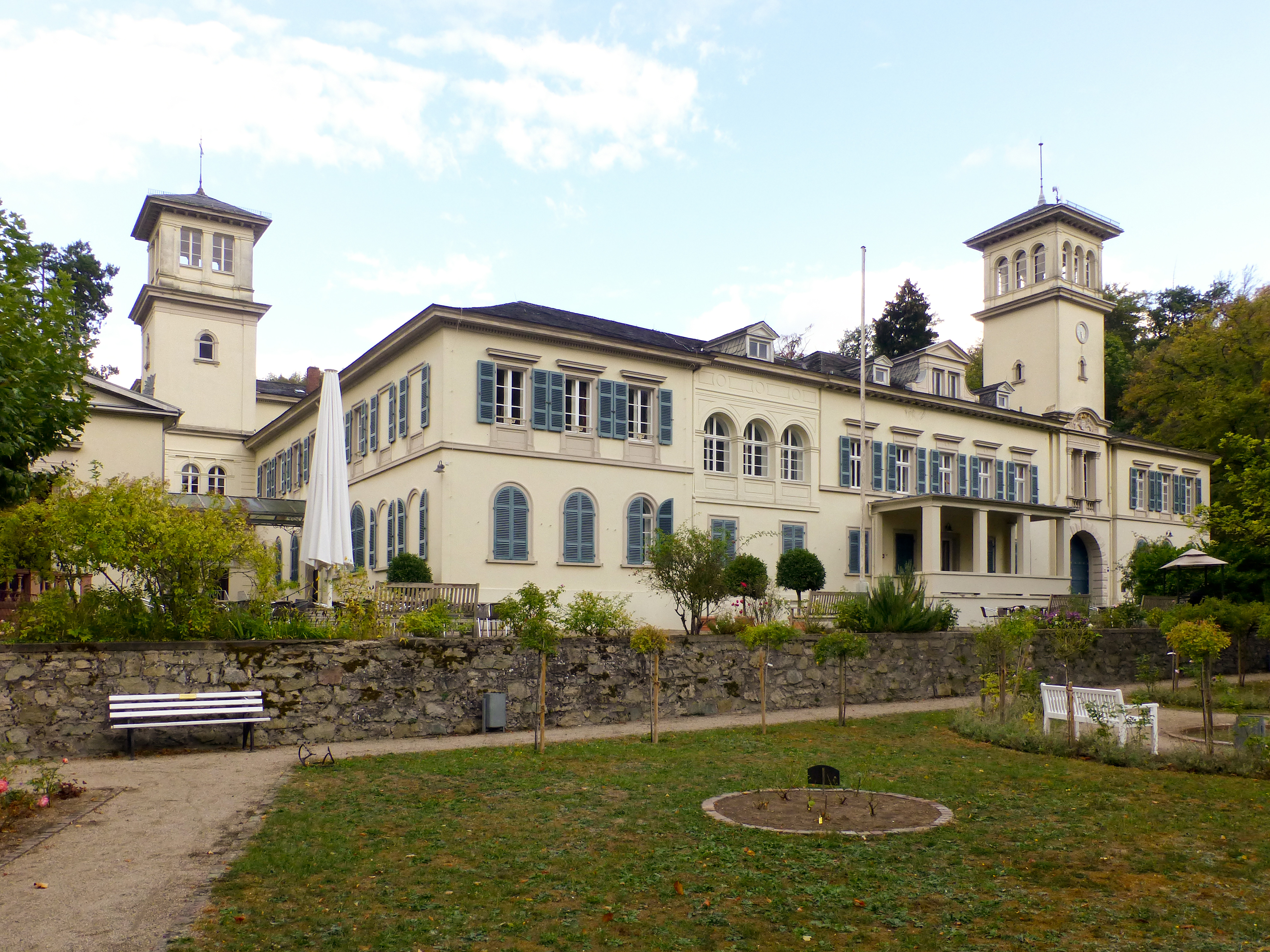 Schloss Heiligenberg in Jugenheim an der Bergstraße